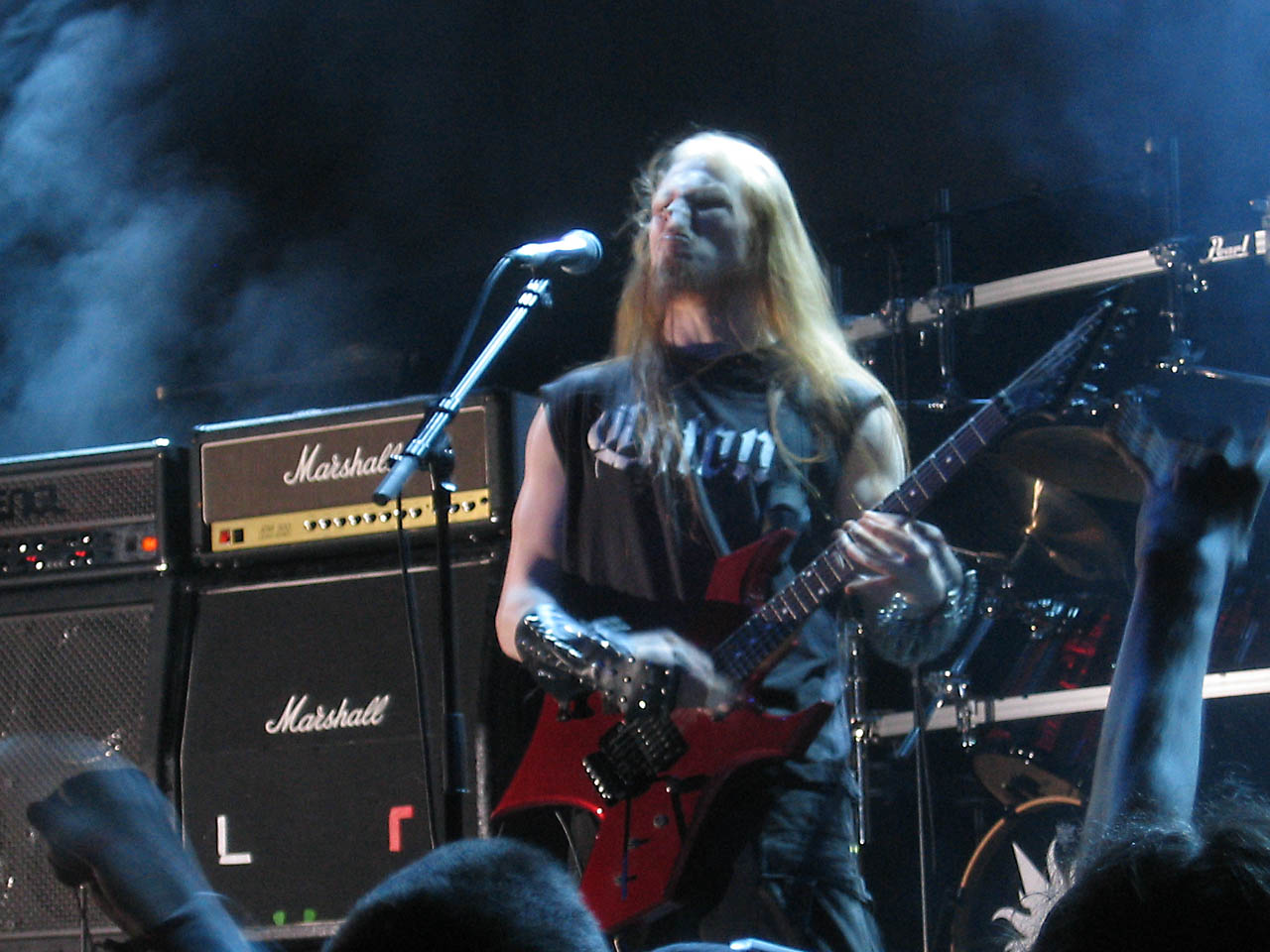 Foto der Band Myrkskog